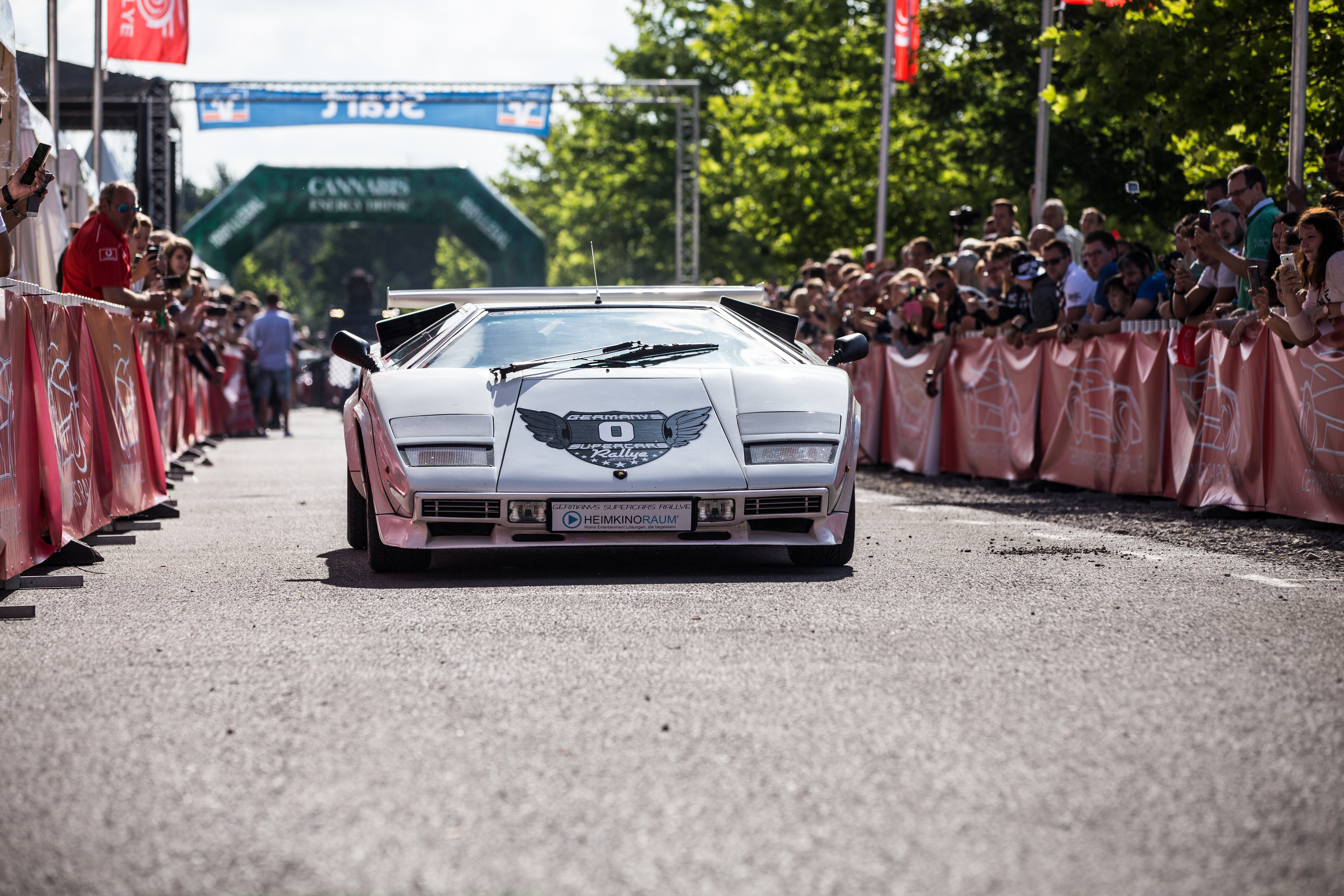 Der Lamborghini Countach beim Start der Germanys Supercars Rallye im Jahr 2016